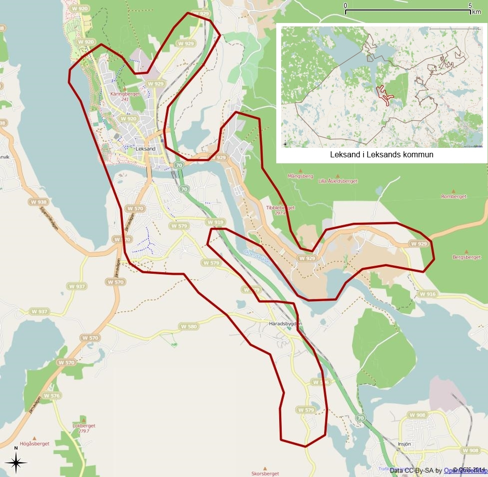 Tätorten Leksands gränser 1990 enligt Atlas över rikets indelningar 1992.